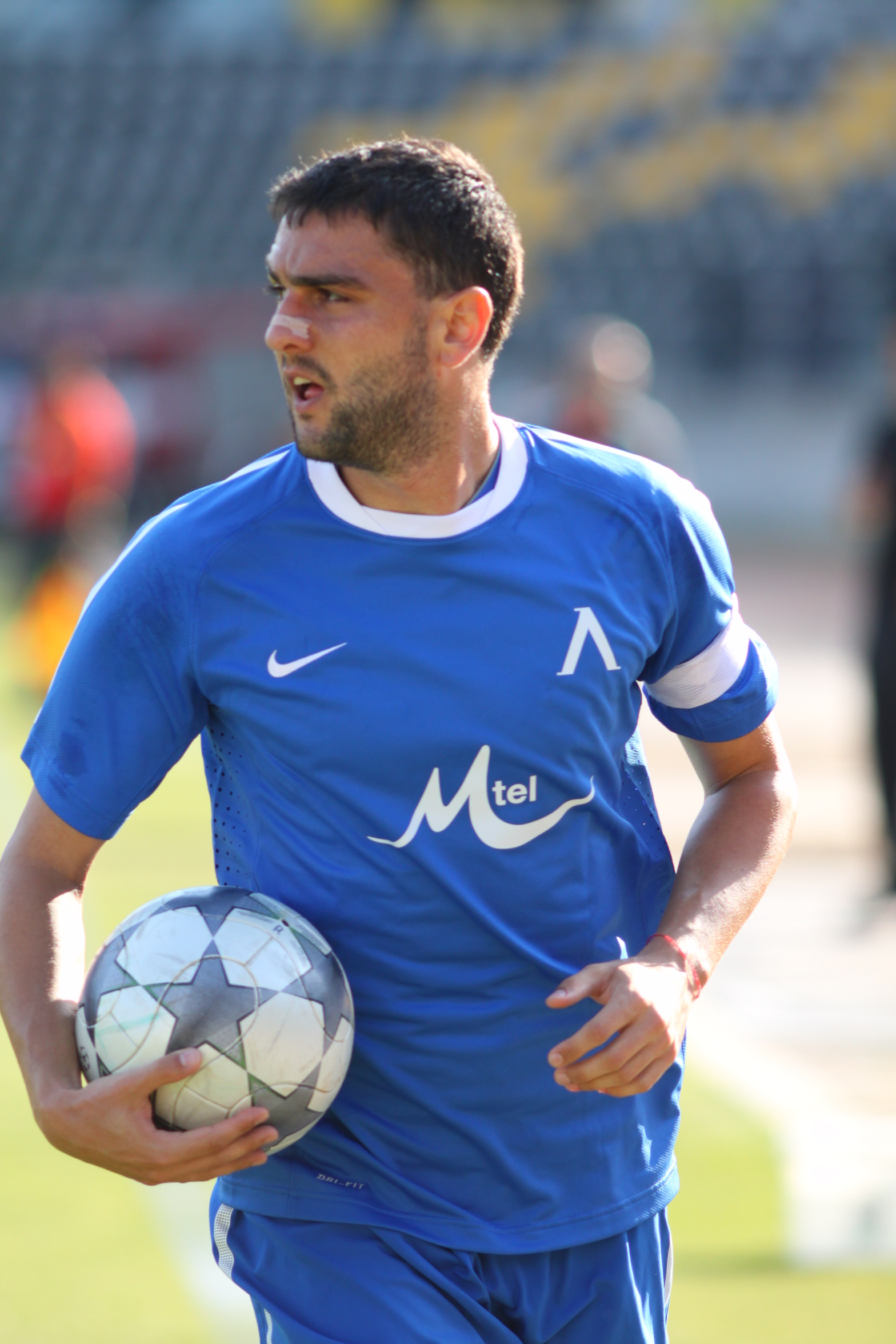 Владимир Гаджев е български футболист, полузащитник, капитан на ПФК Левски София.